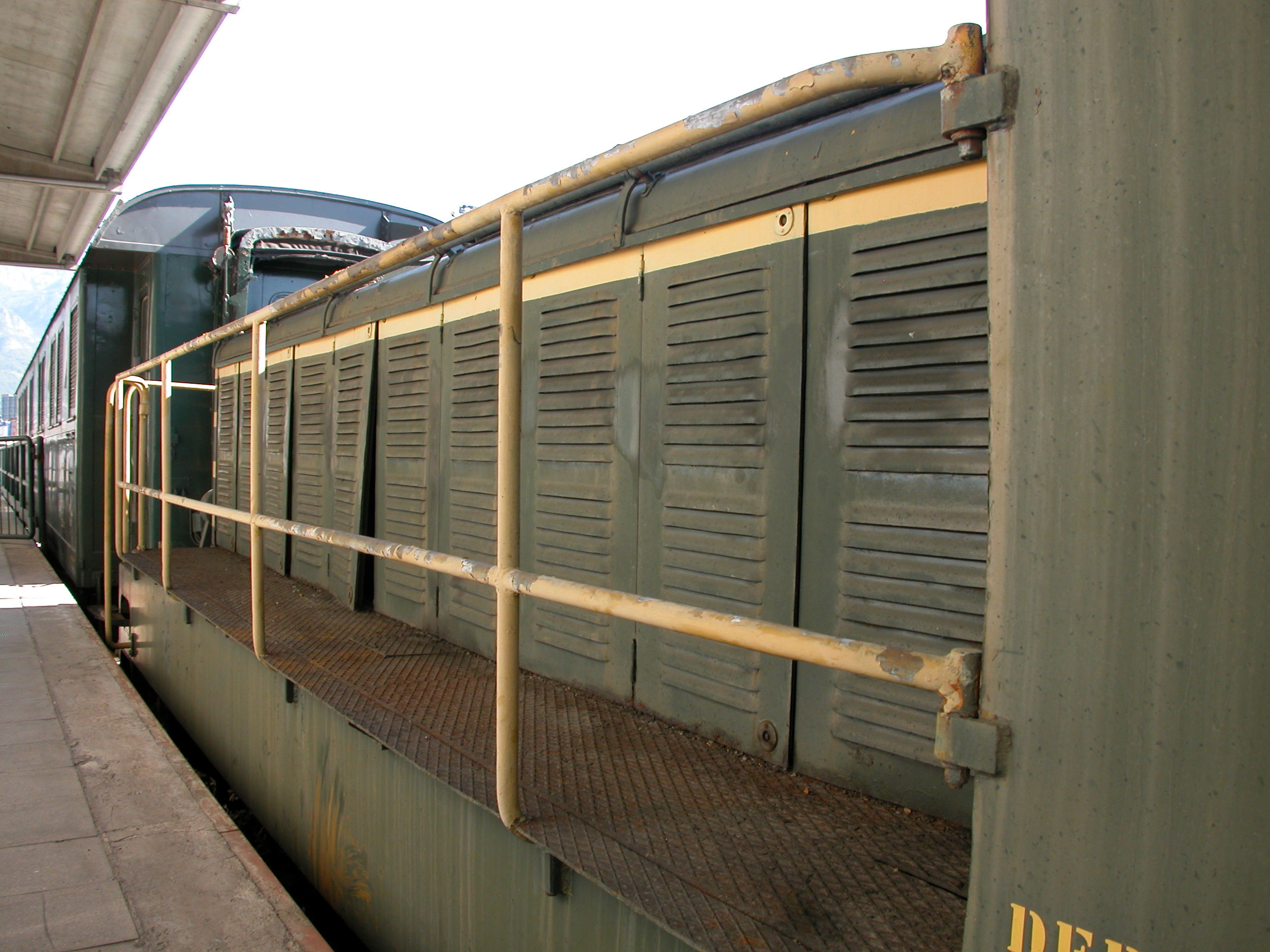 Locomotiva elettrica da manovra FS E.321.003 – Praticabile laterale sinistro dell'avancorpo con gli sportelli d'ispezione delle apparecchiature elettriche.